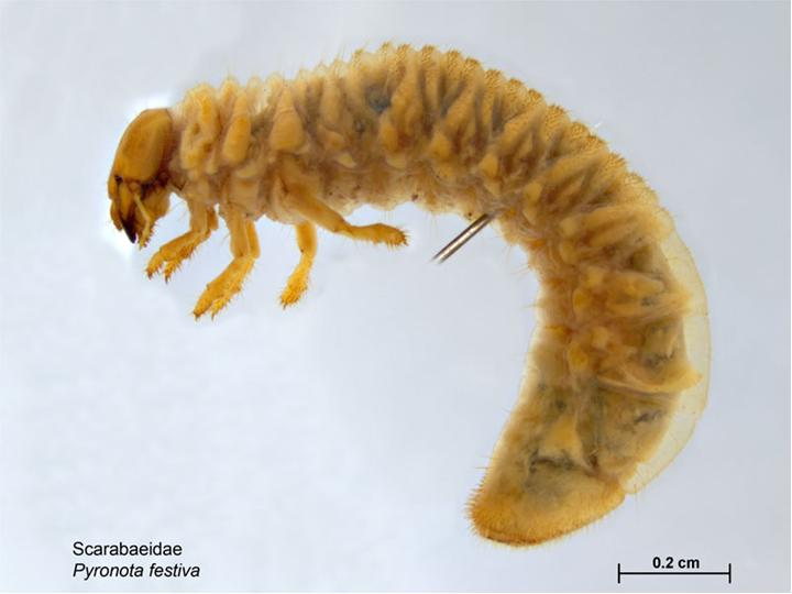 Pyronota festiva, larva